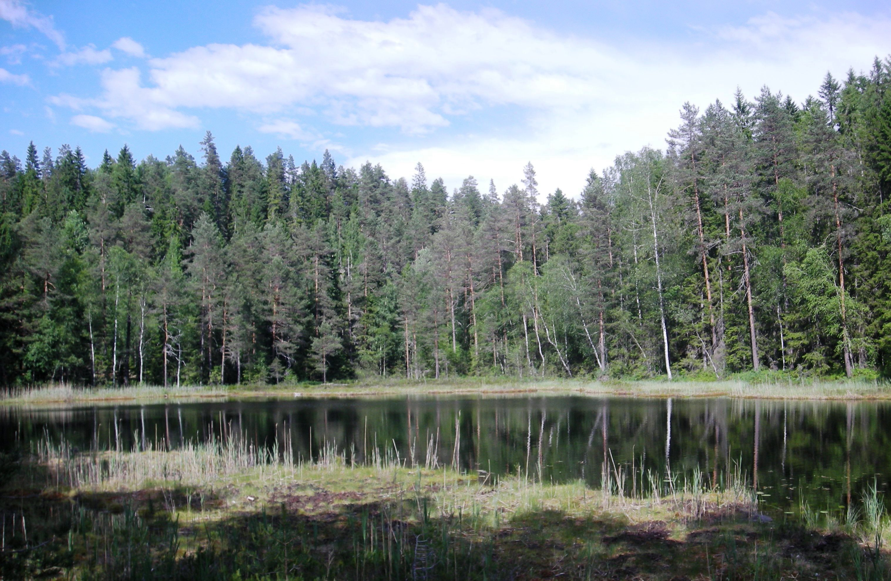 Trollvann i Østmarka i Oslo